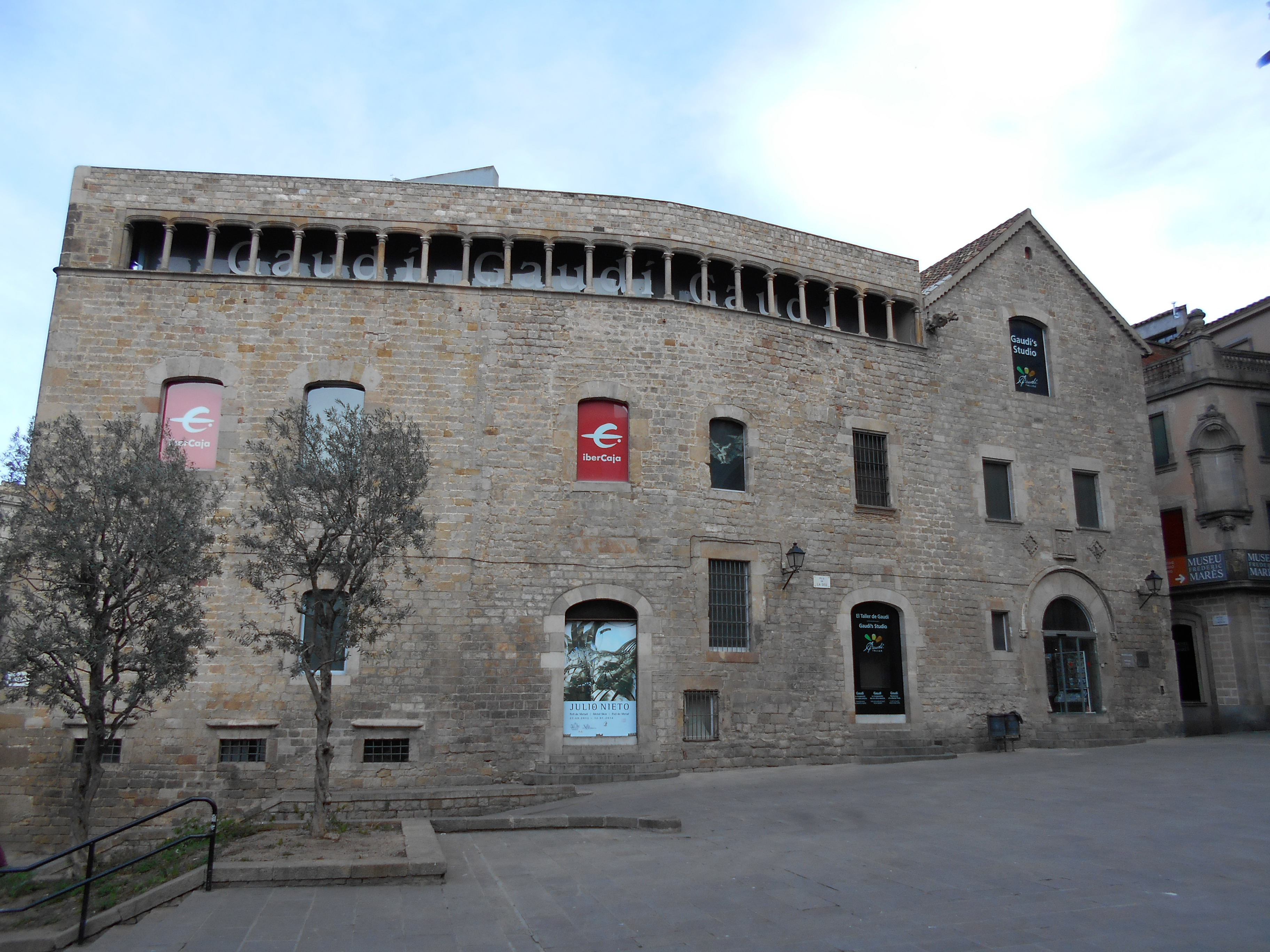 Pia Almoina.